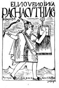 Illustration from the book El primer nueva corónica y buen gobierno